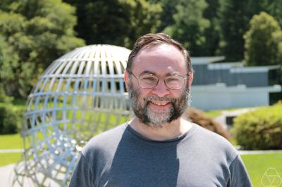 Foto di Alexander Goncharov